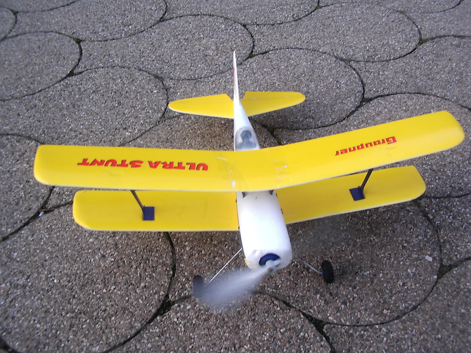 Gummimotorflugzeug Graupner "Ultra Stunt"